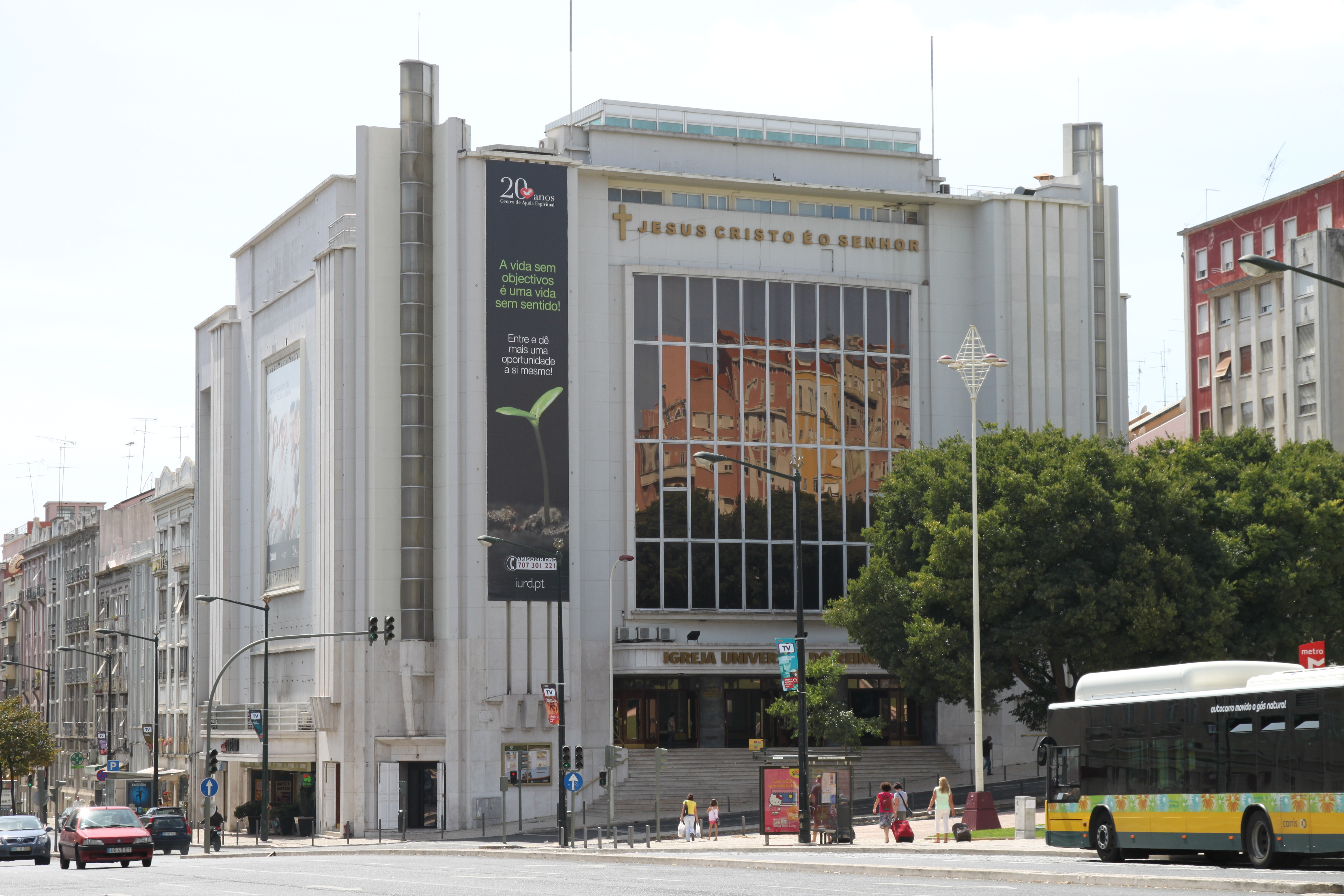 Igreja Universal do Reino de Deus Alameda, Lisboa. Former cinema Império until 1992.